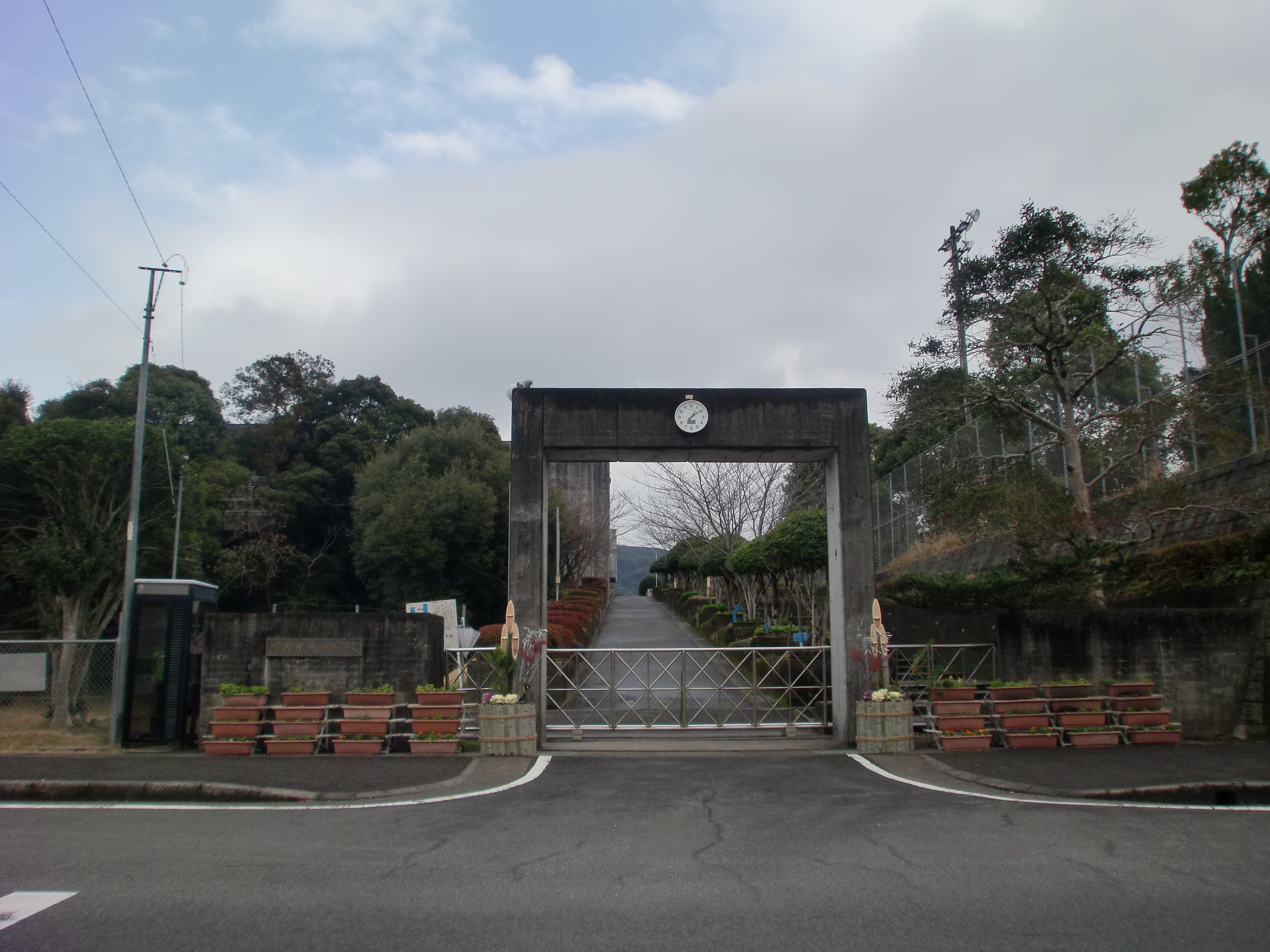 薩摩川内市立川内中央中学校の外観。